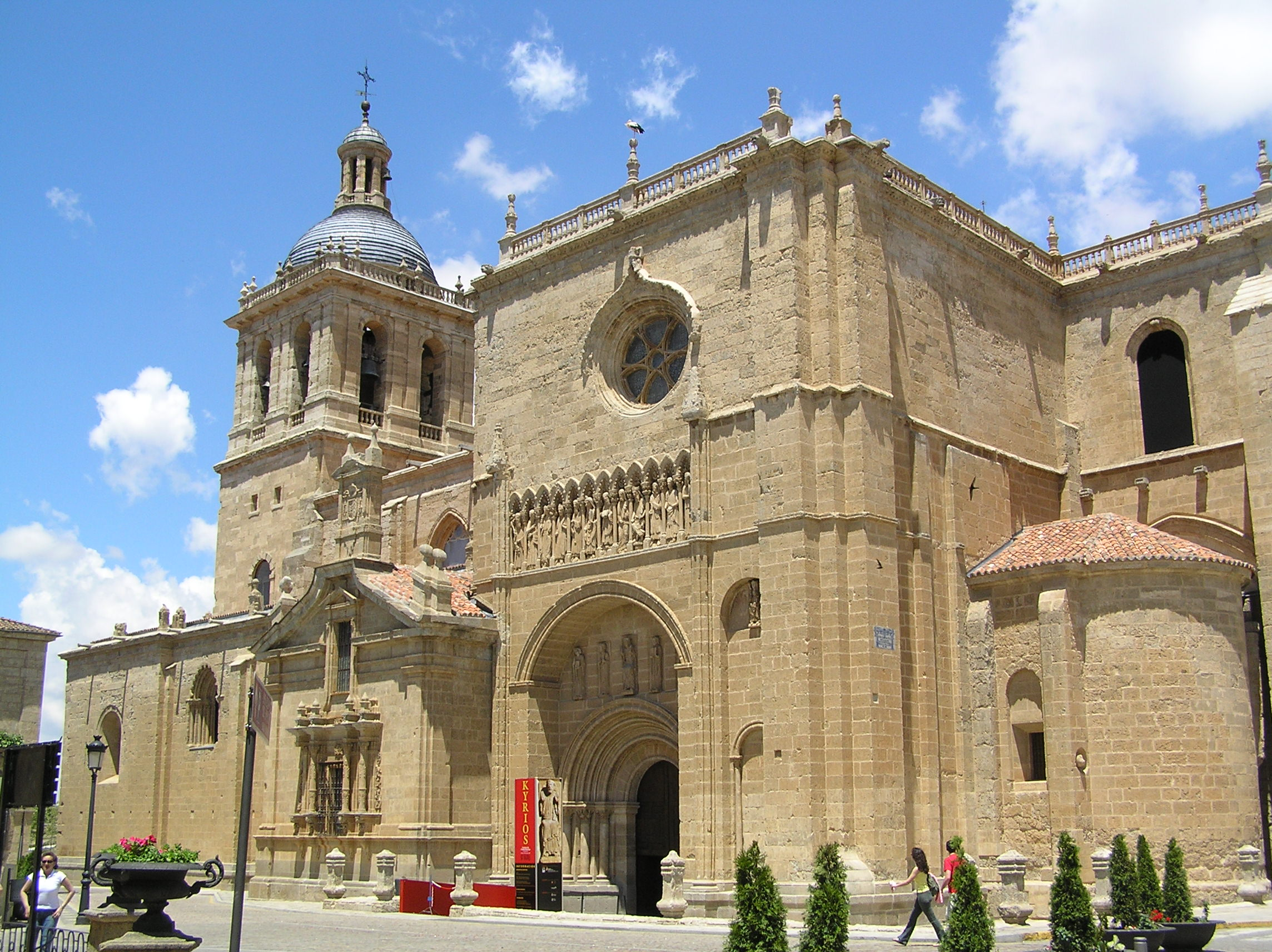 Catedral de Ciudad Rodrigo. Vista general con Portada de las Cadenas en primer plano. Ciudad Rodrigo (provincia de Salamanca, España)